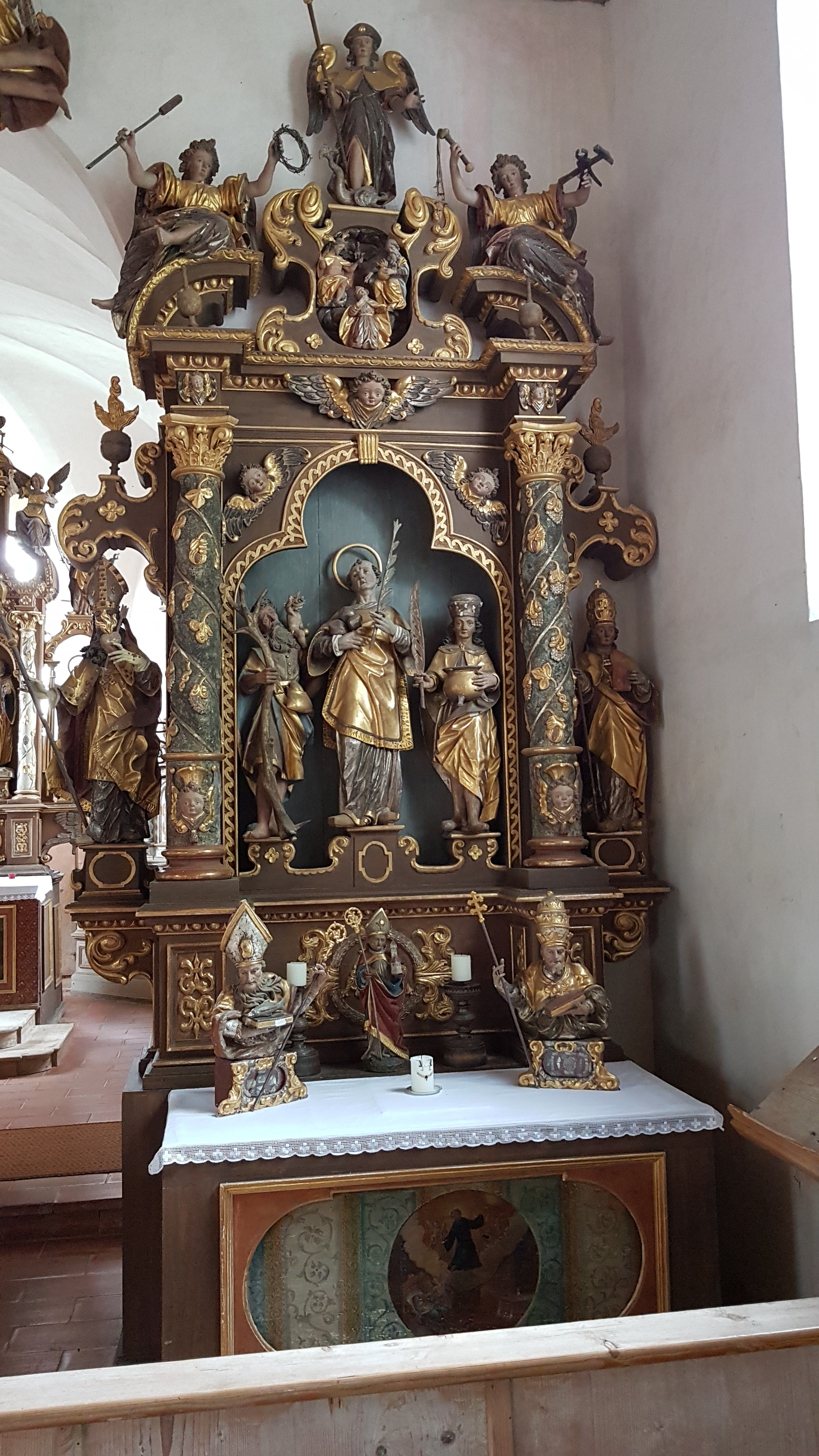 Thaining, Kirche St. Wolfgang, rechter Stephanus-Seitenaltar (1675, Abrosius Degler).